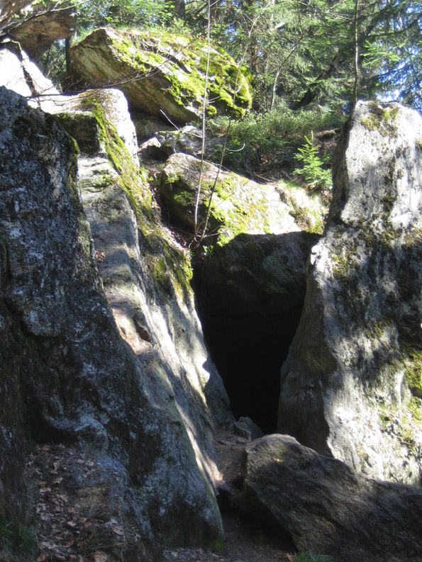 linker Eingang zur Räuber-Heigl-Höhle